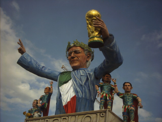 Carro rappresentante i campuioni del mondo di calcio al carnevale di viareggio.